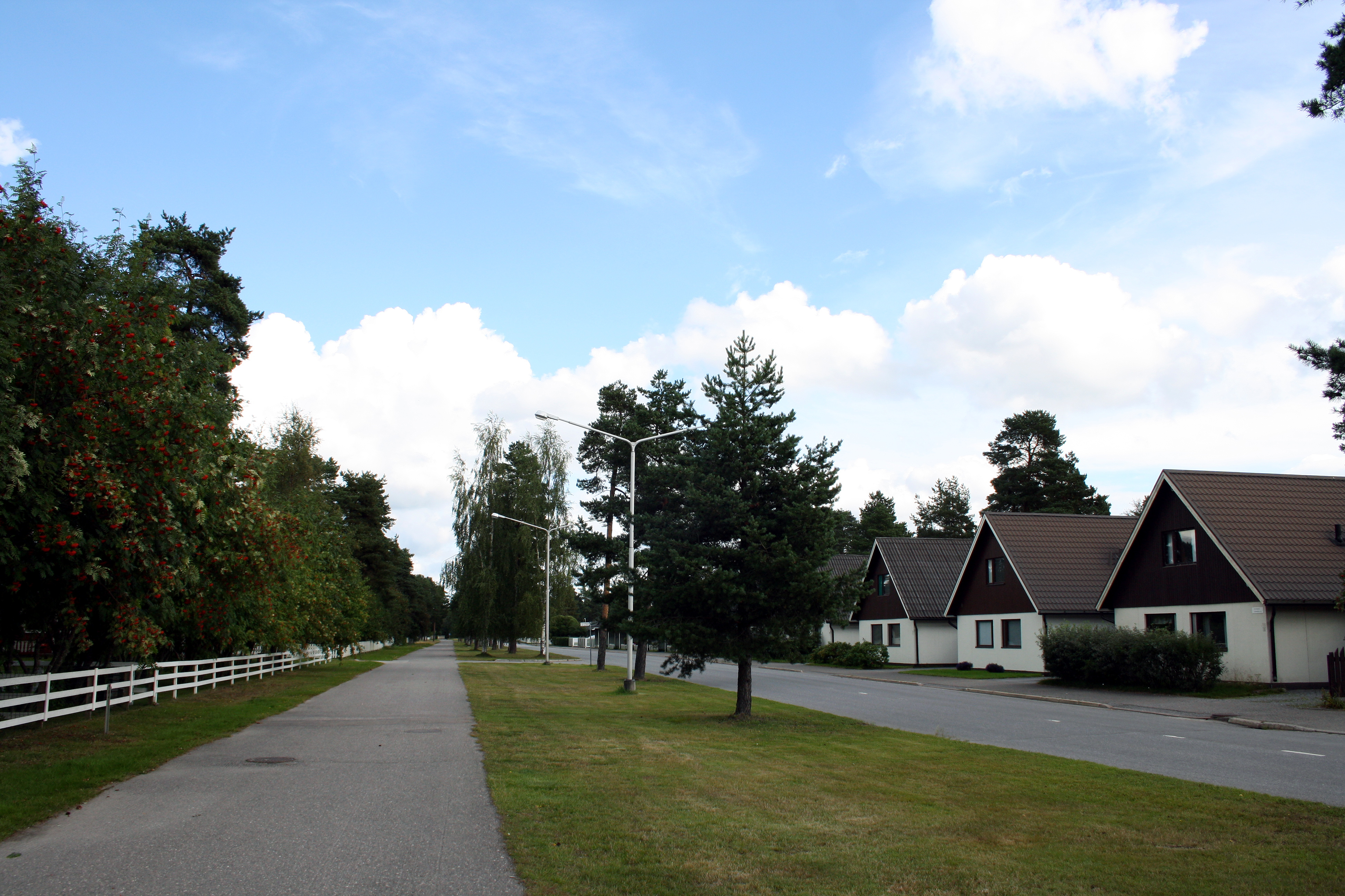 Koivuhaan kaupunginosaa Kokkolassa.